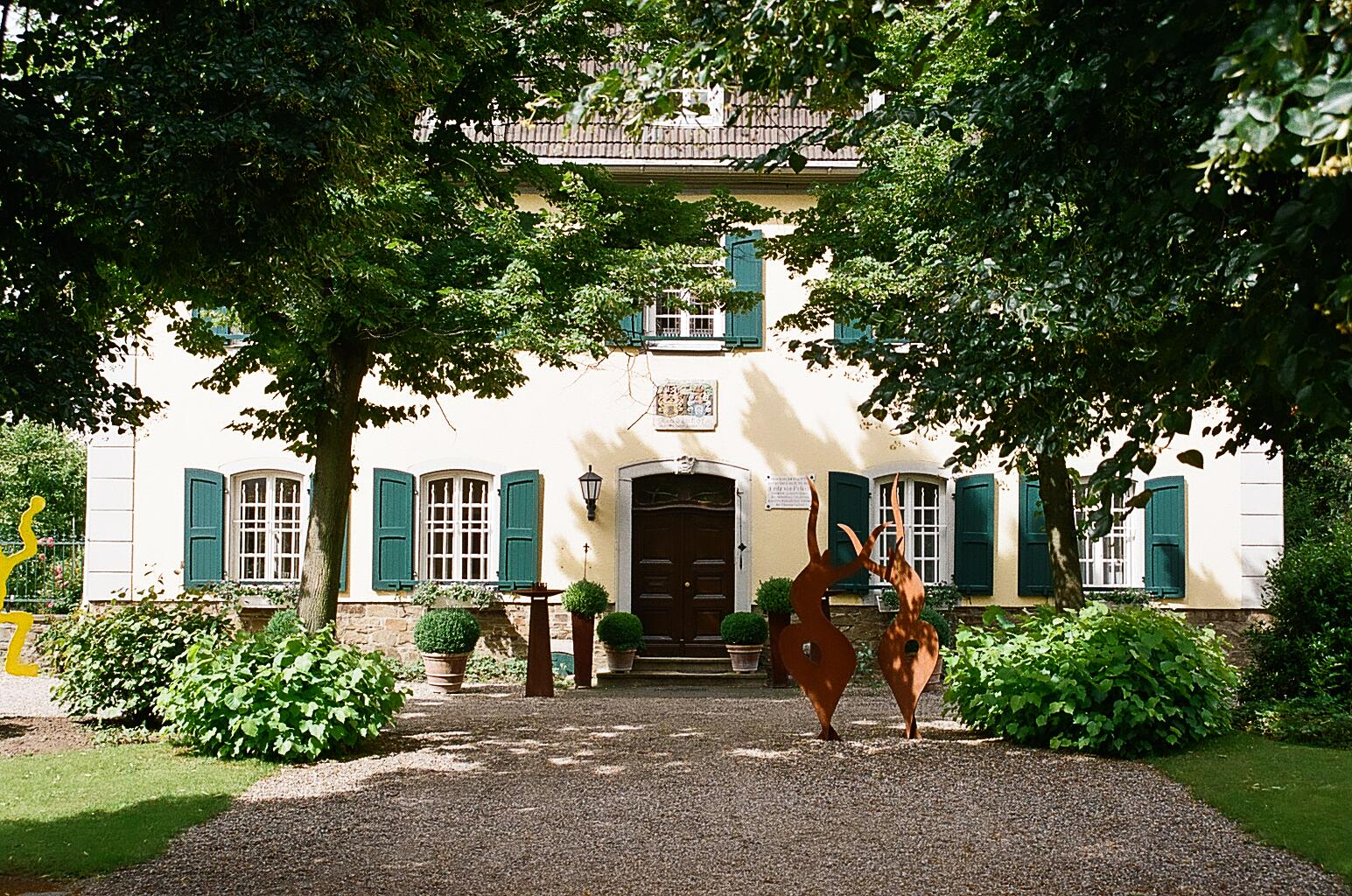 Lindenhof in Hennef, Frankfurter Straße 123